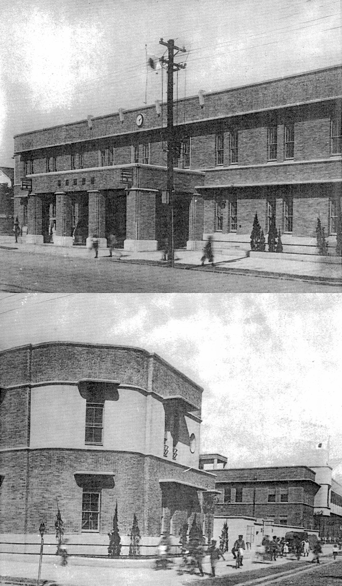 中文（台灣）: 1938年新築的嘉義郵便局正面與背面照